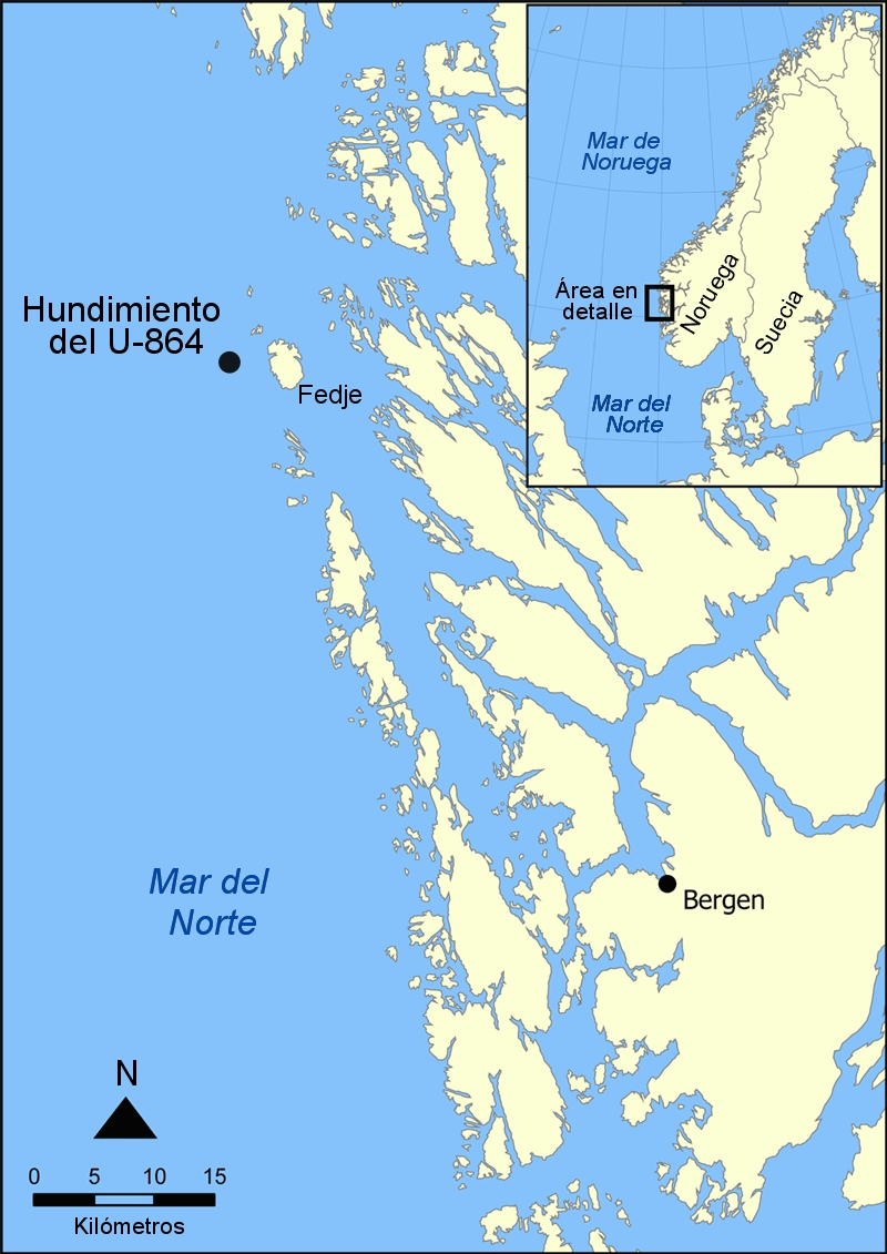 Mapa en el que se representa la localización del lugar en que se hundió el submarino alemán U-864, en la costa de Noruega.